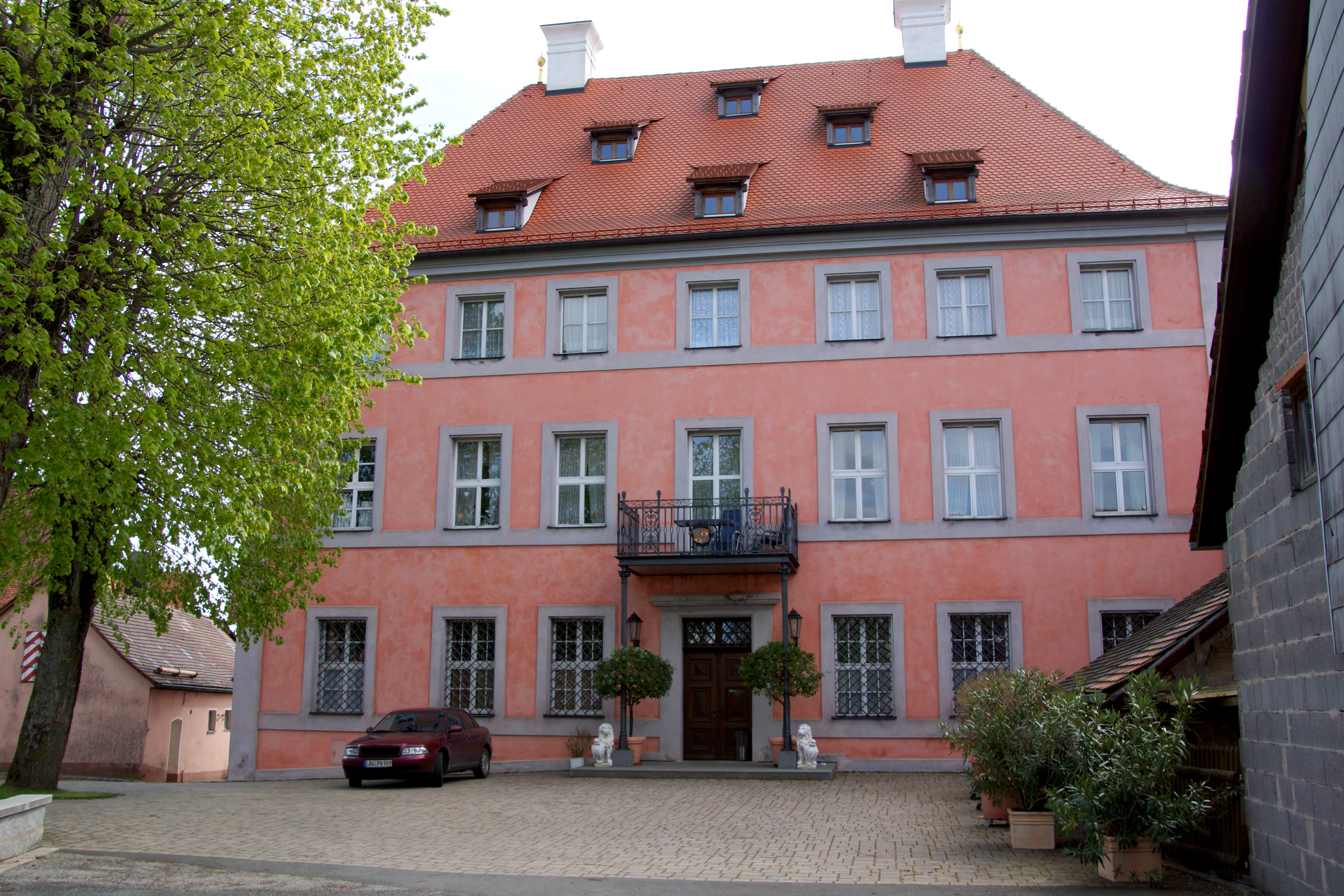 Das ehemalige Schloss der Nürnberger Patrizierfamilie Oelhafen in Eismannsberg bei Altdorf